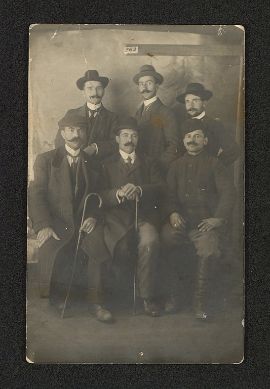 Ангел Узунов, Александър Чакъров, Наум Асенов, Милан Матов, Христо Матов